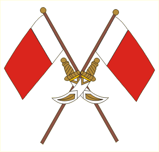 Ecut d'Ajman